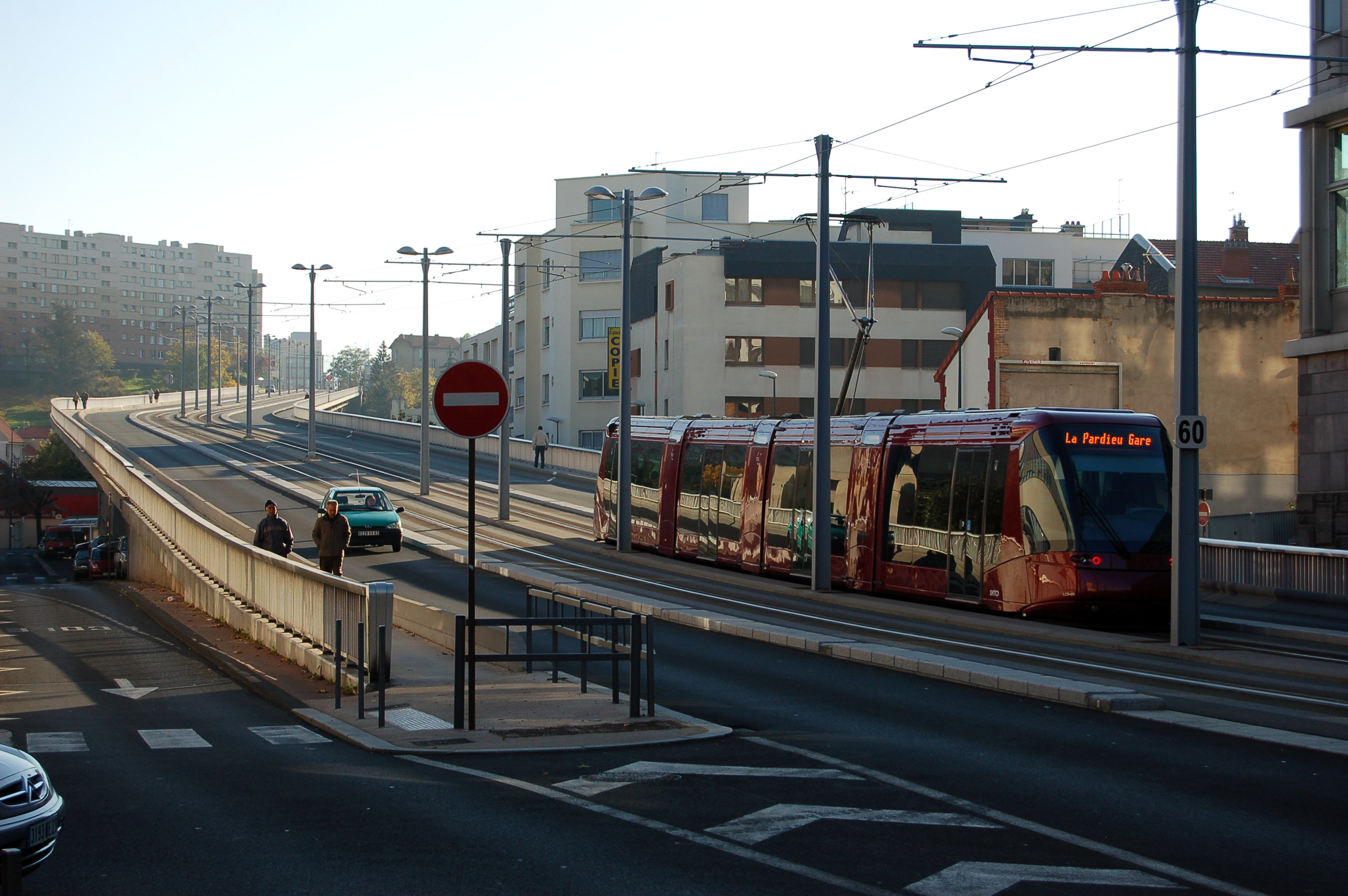 Le tramway de Clermont-Ferrand emprunte le viaduc Saint-Jacques (Clermont-Ferrand, France)